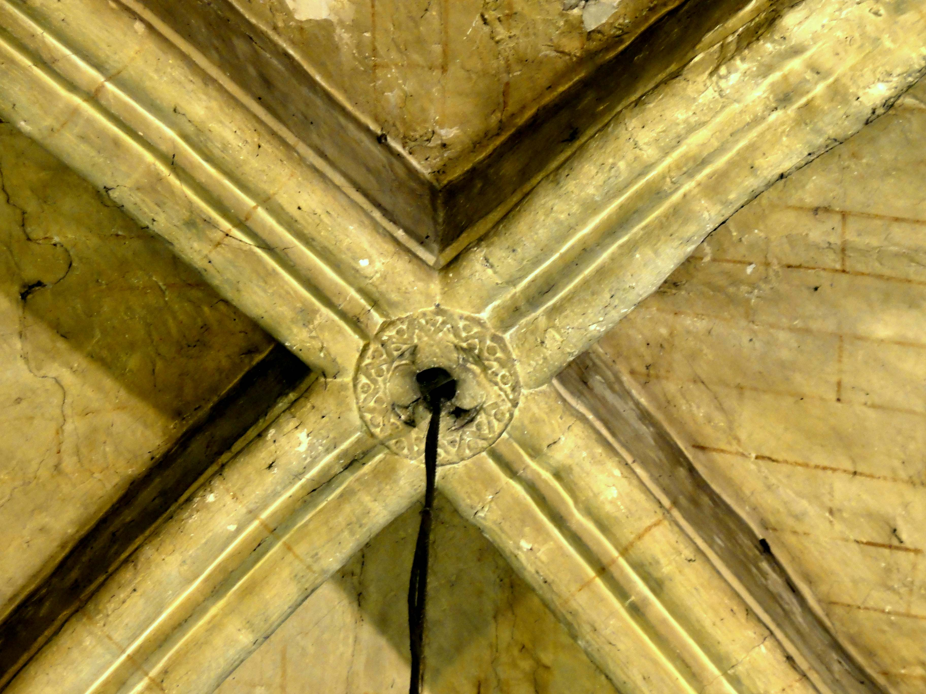 Chœur, clé de voûte de la première travée.